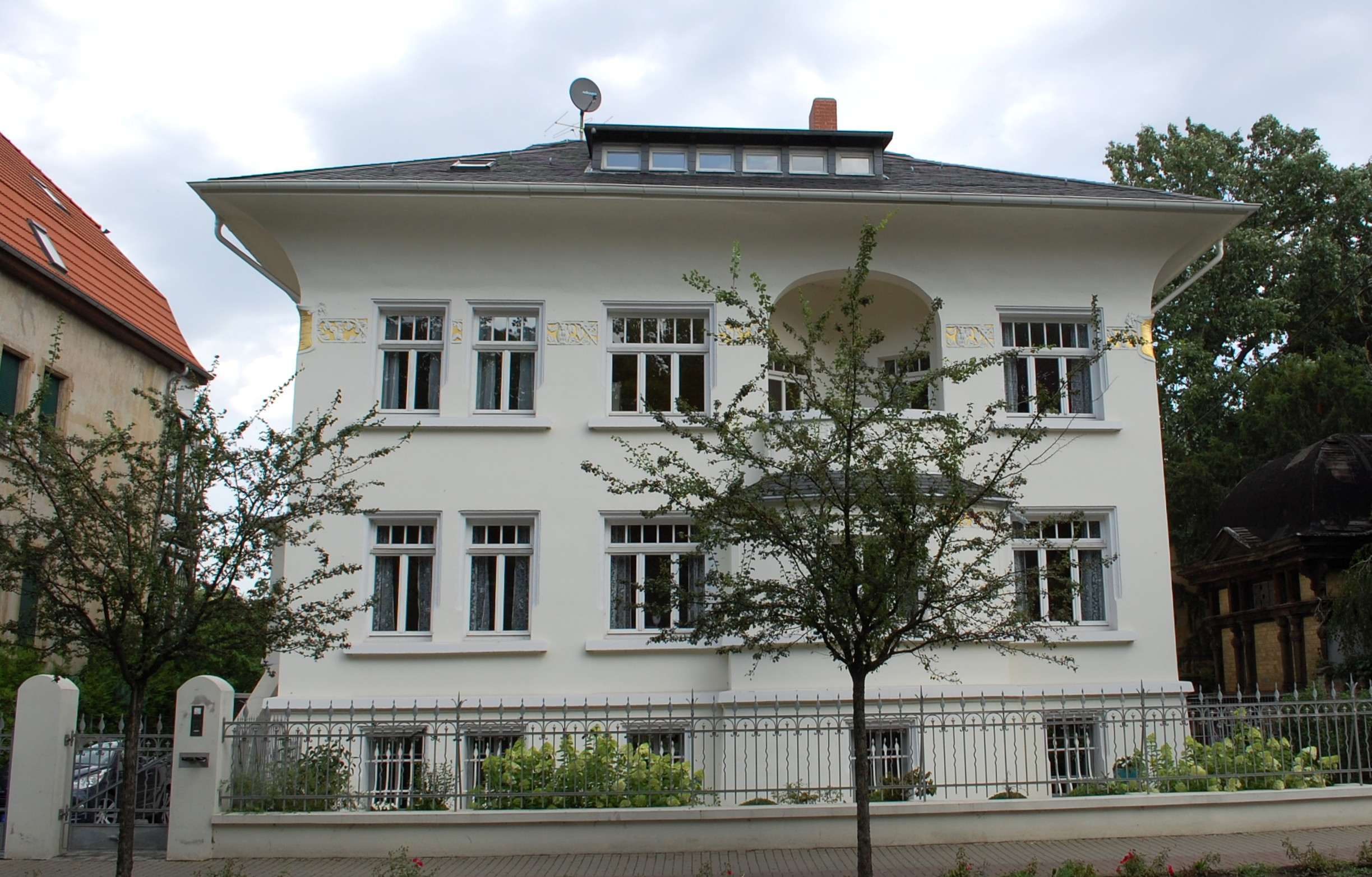 Wohnhaus Am Schiffbleek 11a in Quedlinburg; unter Denkmalschutz